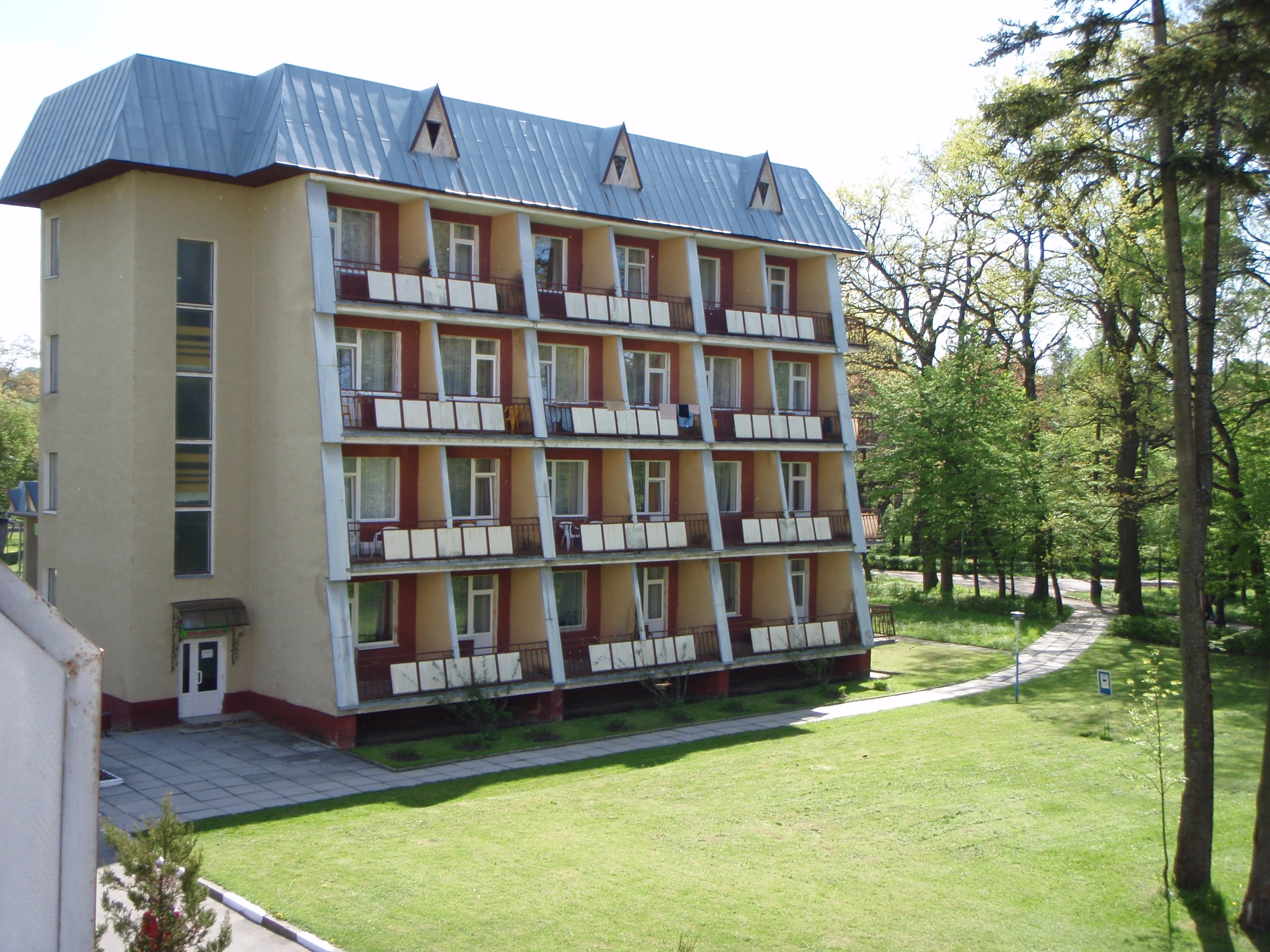 Корпус санаторію "Перлина Прикарпаття", місто Моршин, Львівська область, Україна